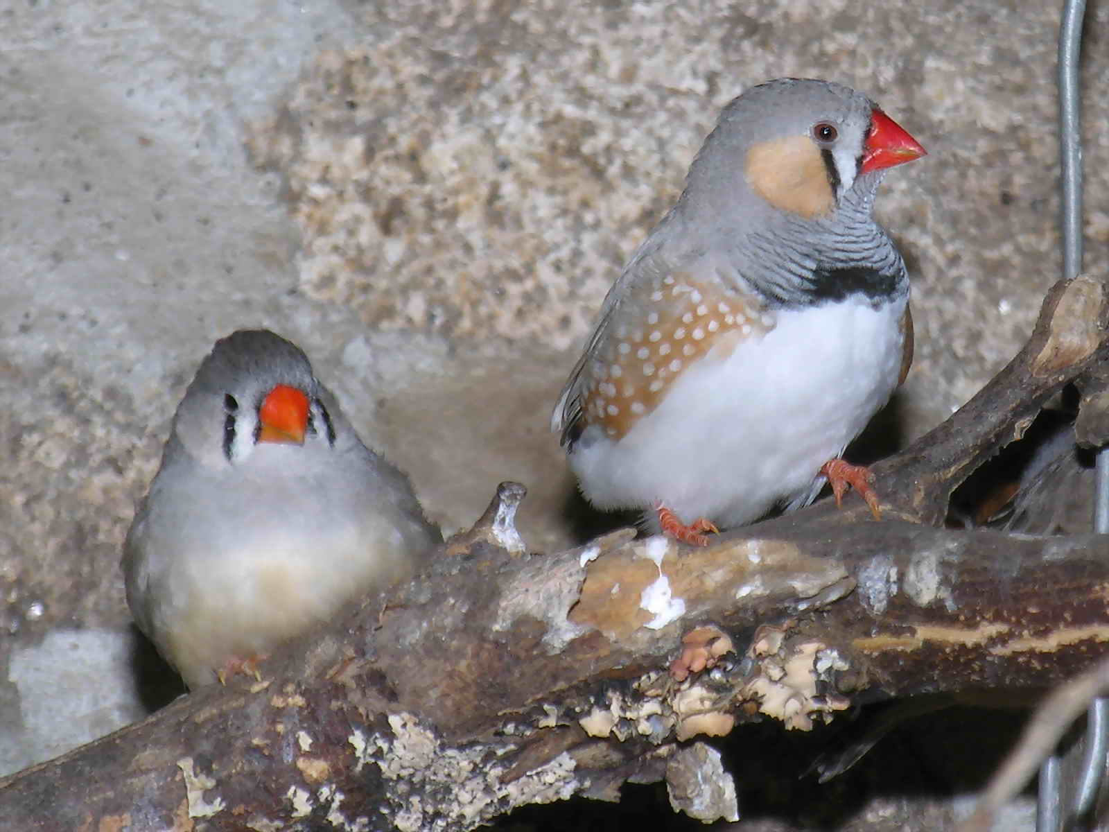 Taeniopygia guttata (Zebra finch)